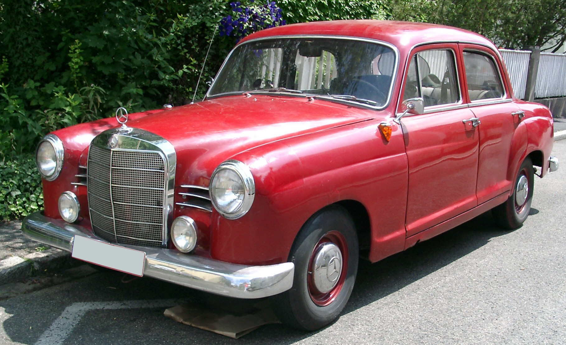 Mercedes-Benz 190D